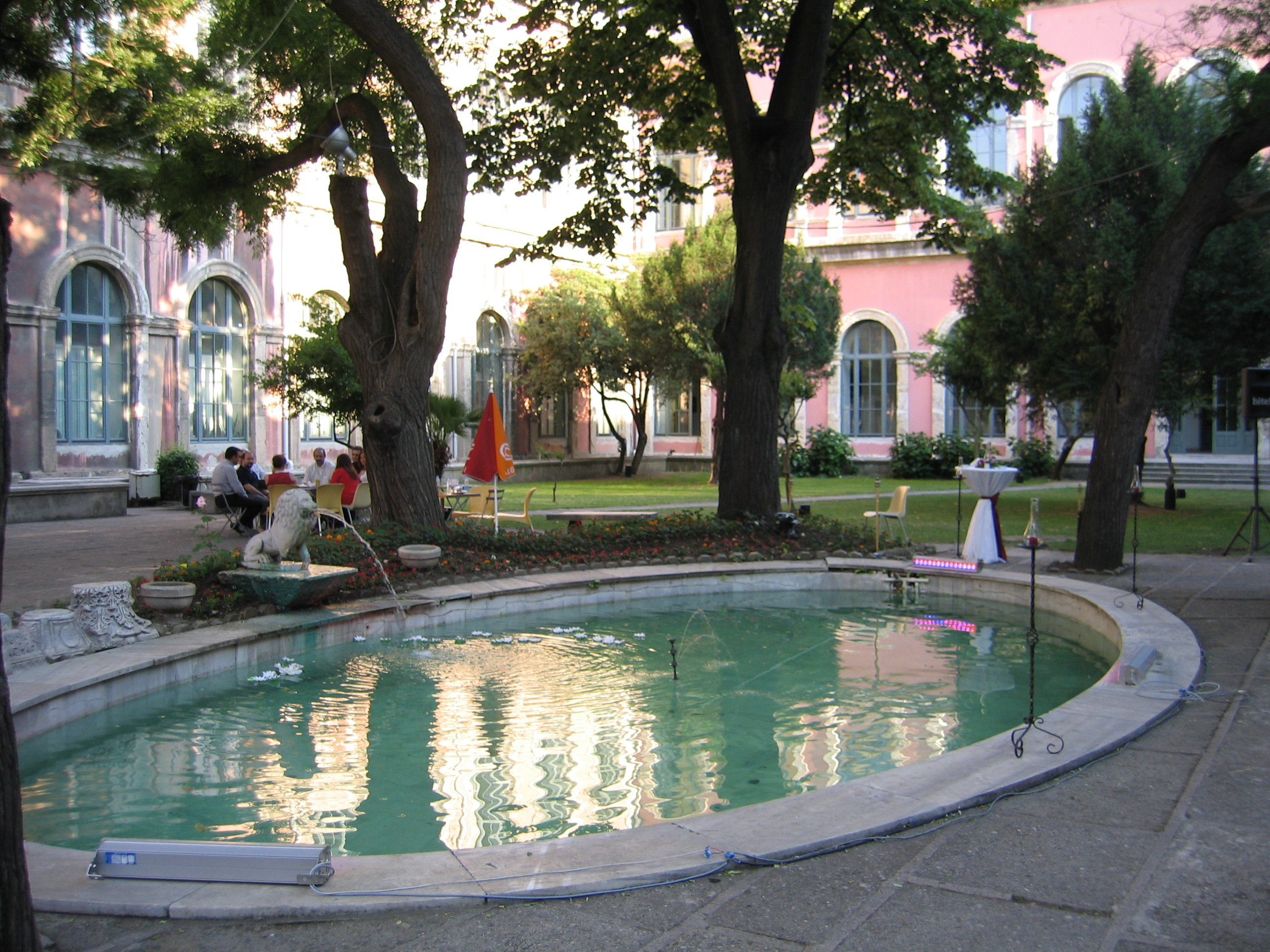 ITU Taşkışla Campus interior, Istanbul, Turkey. Photo by Babak Gholizadeh, June 2007.